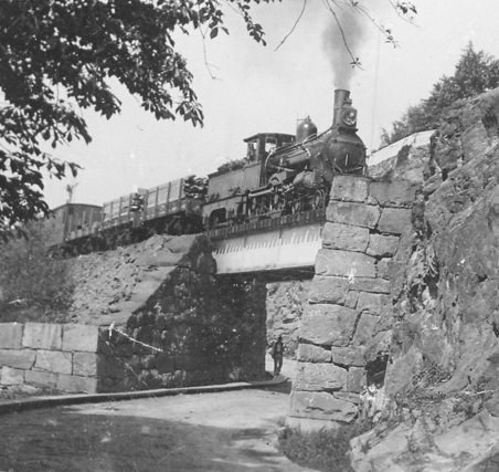 Tog med damplok type 9 krysser Ljabrochausséen like sør for Bekkelaget stasjon.